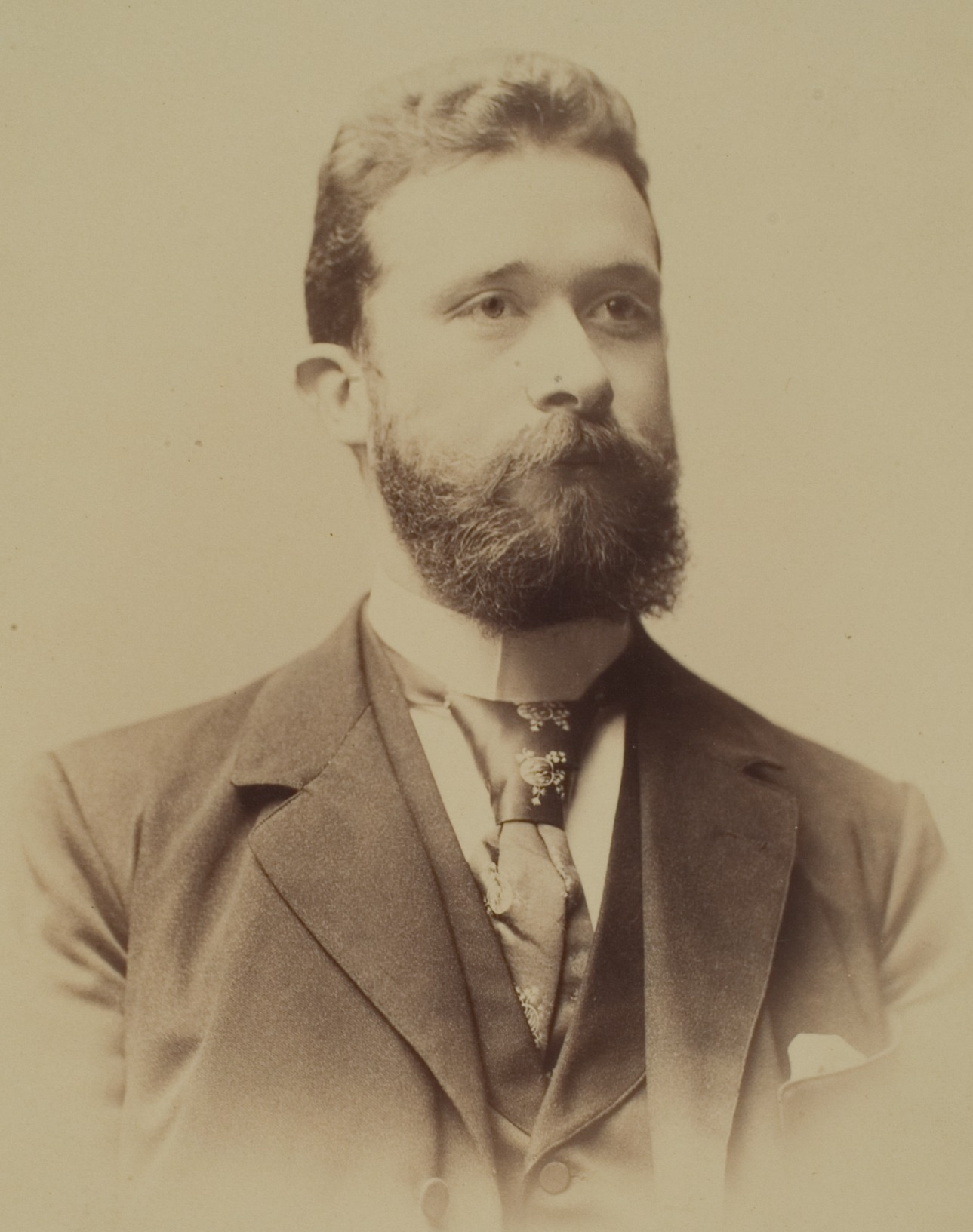 Oscar Vulpius, Orthopäde, 1902–1928 Professor in Heidelberg